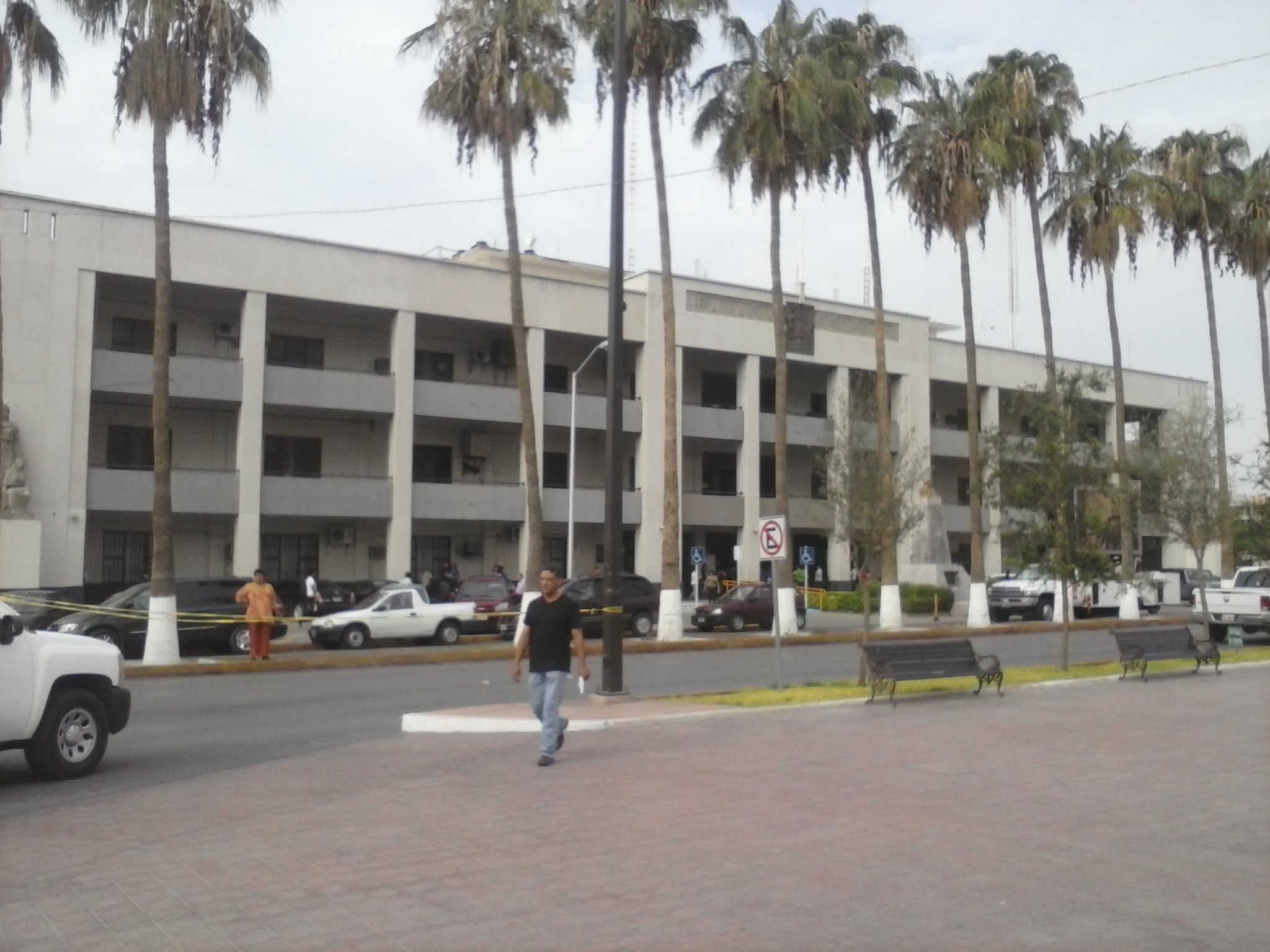 Palacio Federal construido en 1946, patrimonio de Torreón.